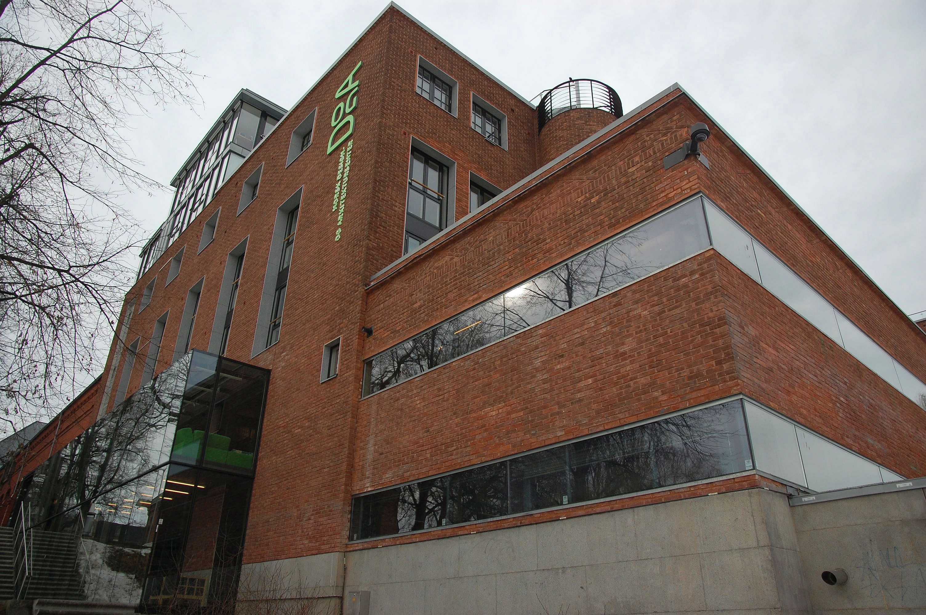 DogA Norsk Design- og Arkitektursenter Hausmanns gate 16 i Oslo. Elvebredden Café leier lokale i samme bygg, sammen med Norsk Designråd og Norsk Form.